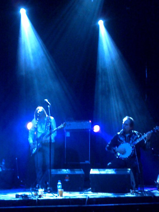 Emil og Åsmund Live 2011